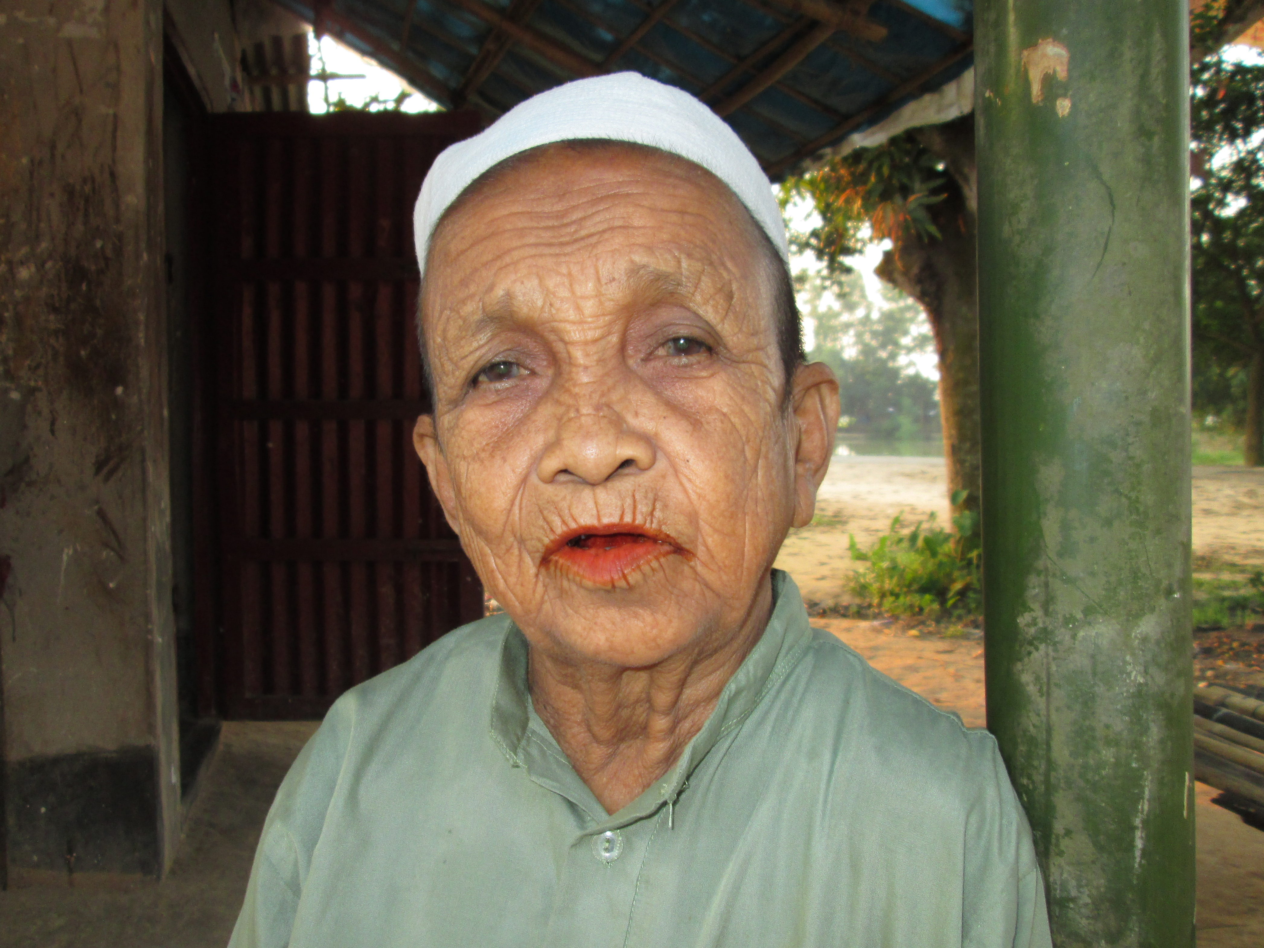 আব্দুল গণি